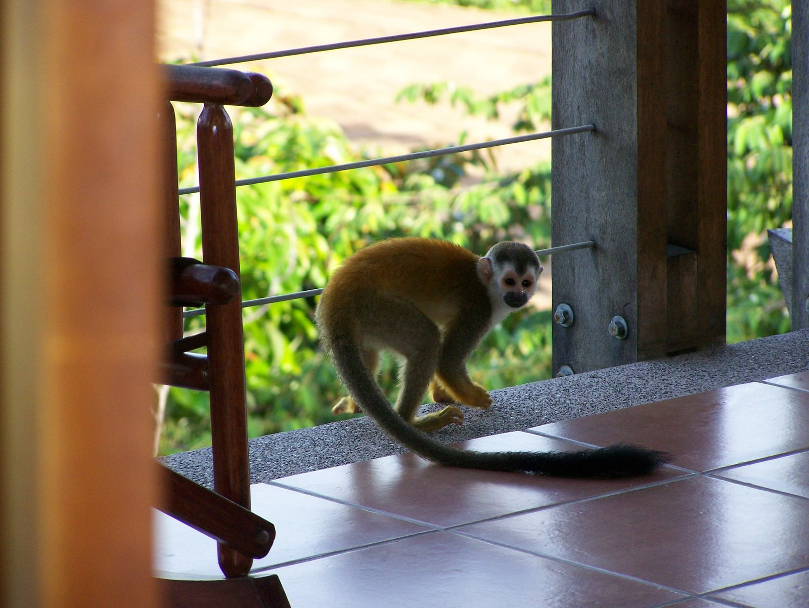 Central American Squirrel Monkey near Manuel Antonio, Costa Rica